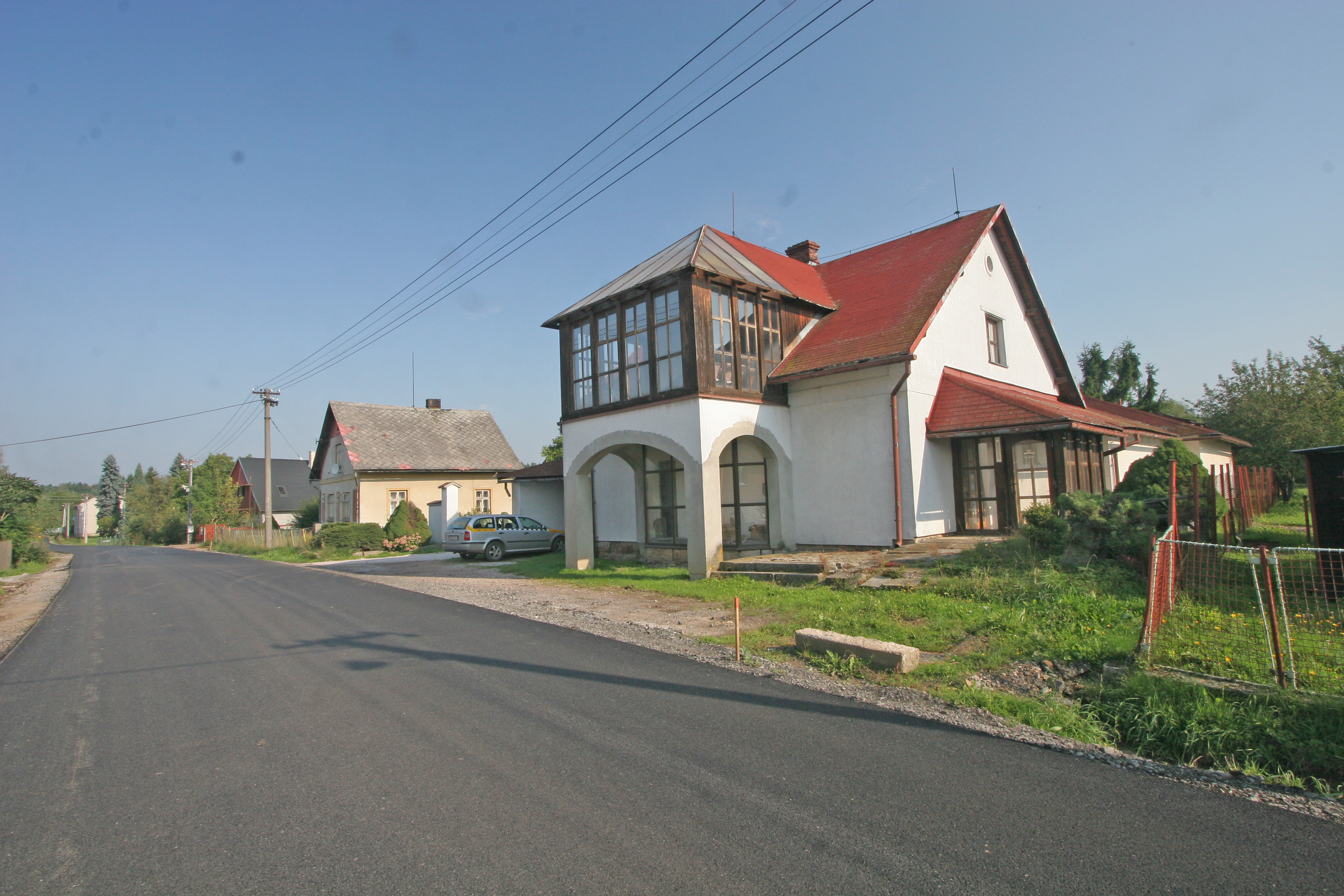 Komárov čp. 75